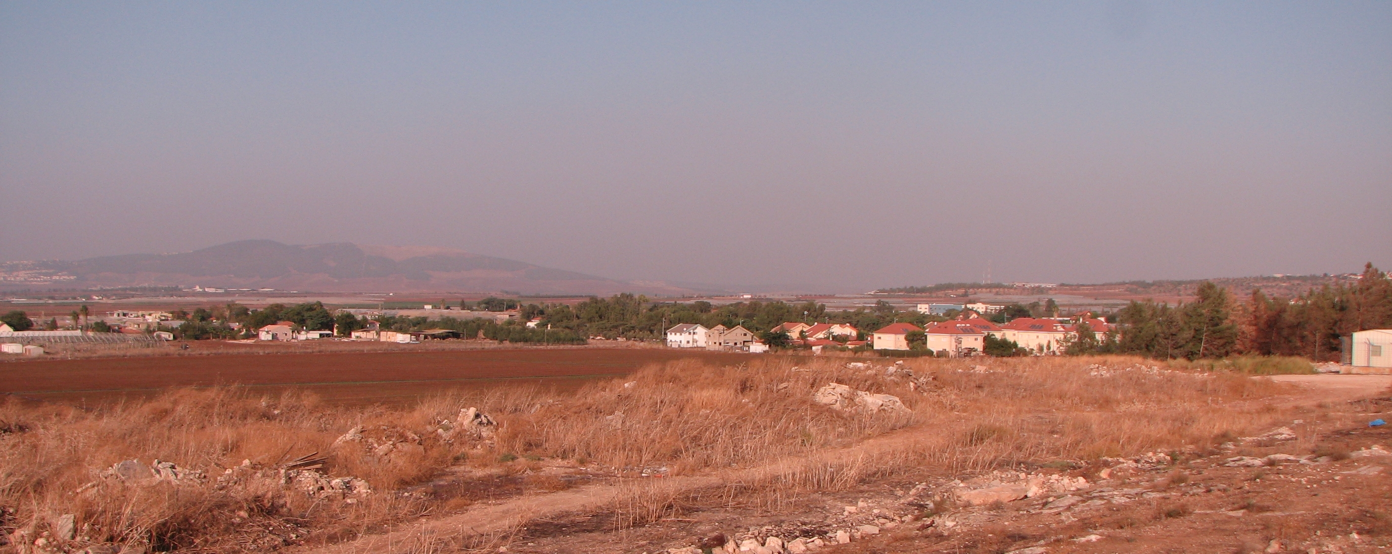 מגן שאול מדרום